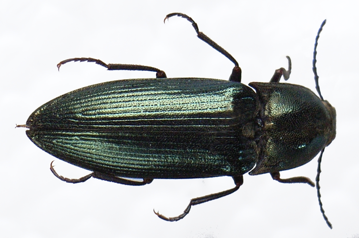 Female Ctenicera pectinicornis